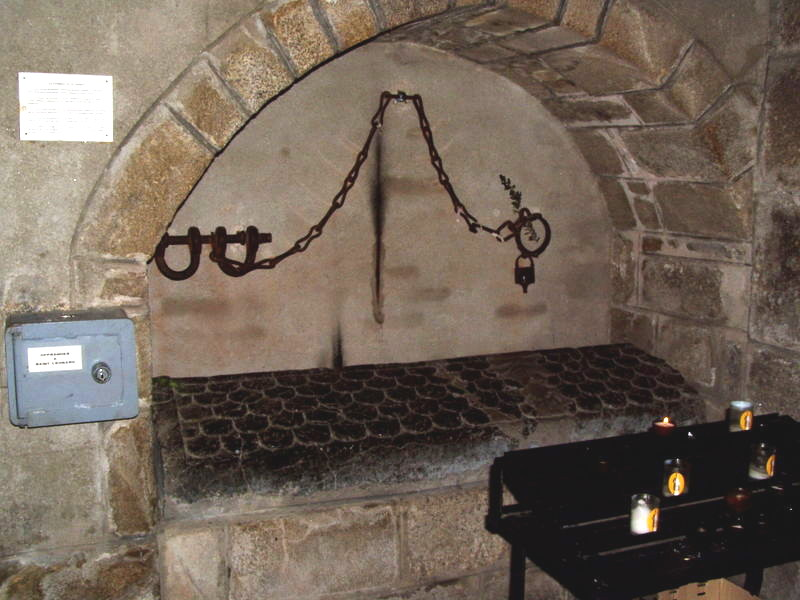 Le tombeau de Saint Léonard à Saint-Léonard-de-Noblat (France).